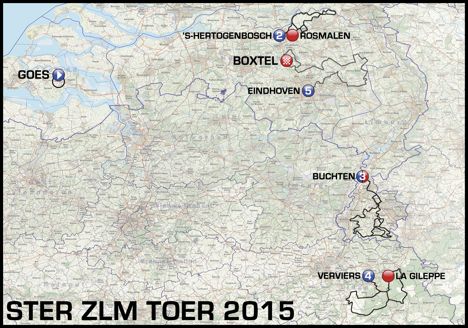 Parcours du Ster ZLM Toer 2015.